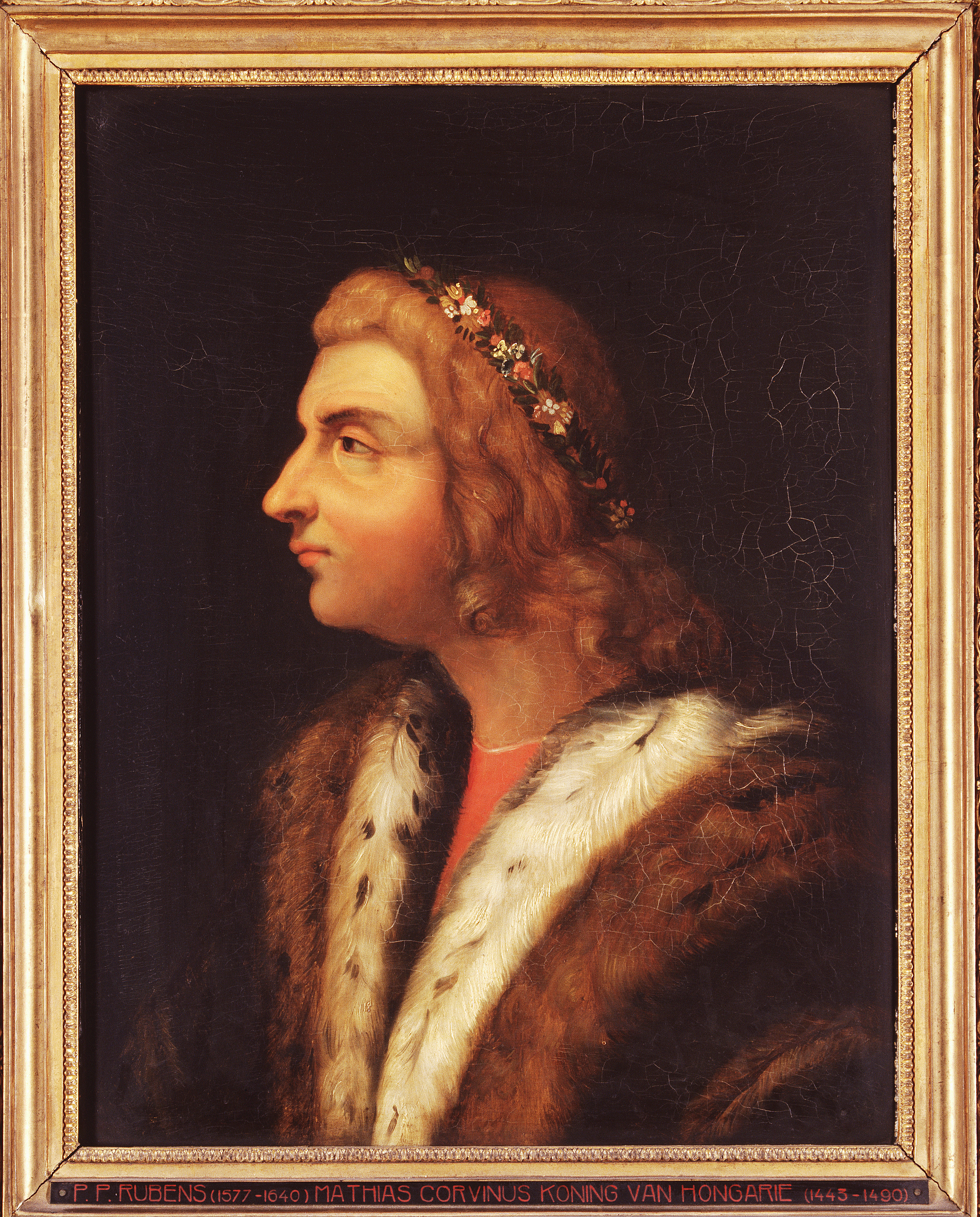 schilderij ( Peter Paul Rubens ( Museum Plantin-Moretus